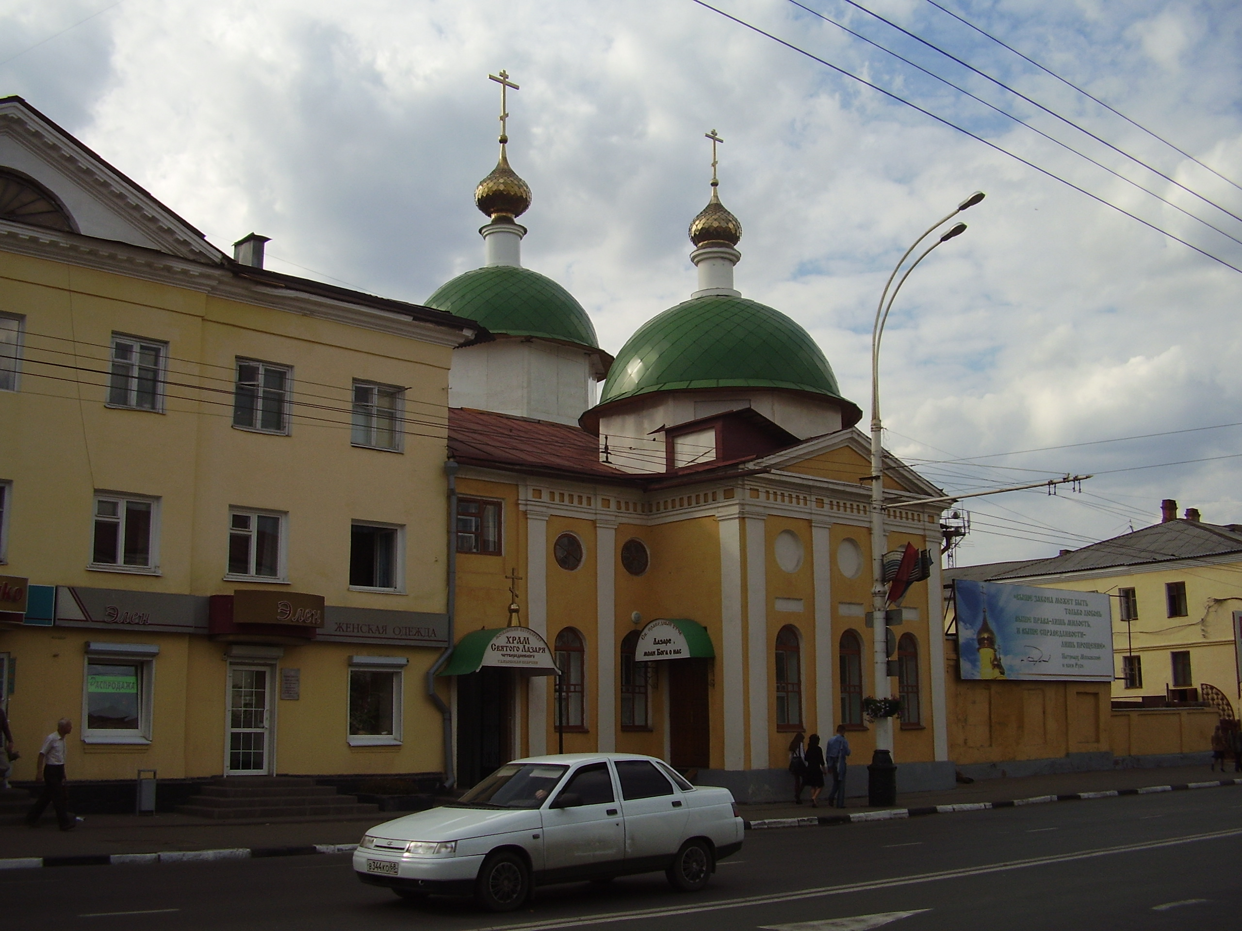 Тамбов,храм_святого_Лазаря